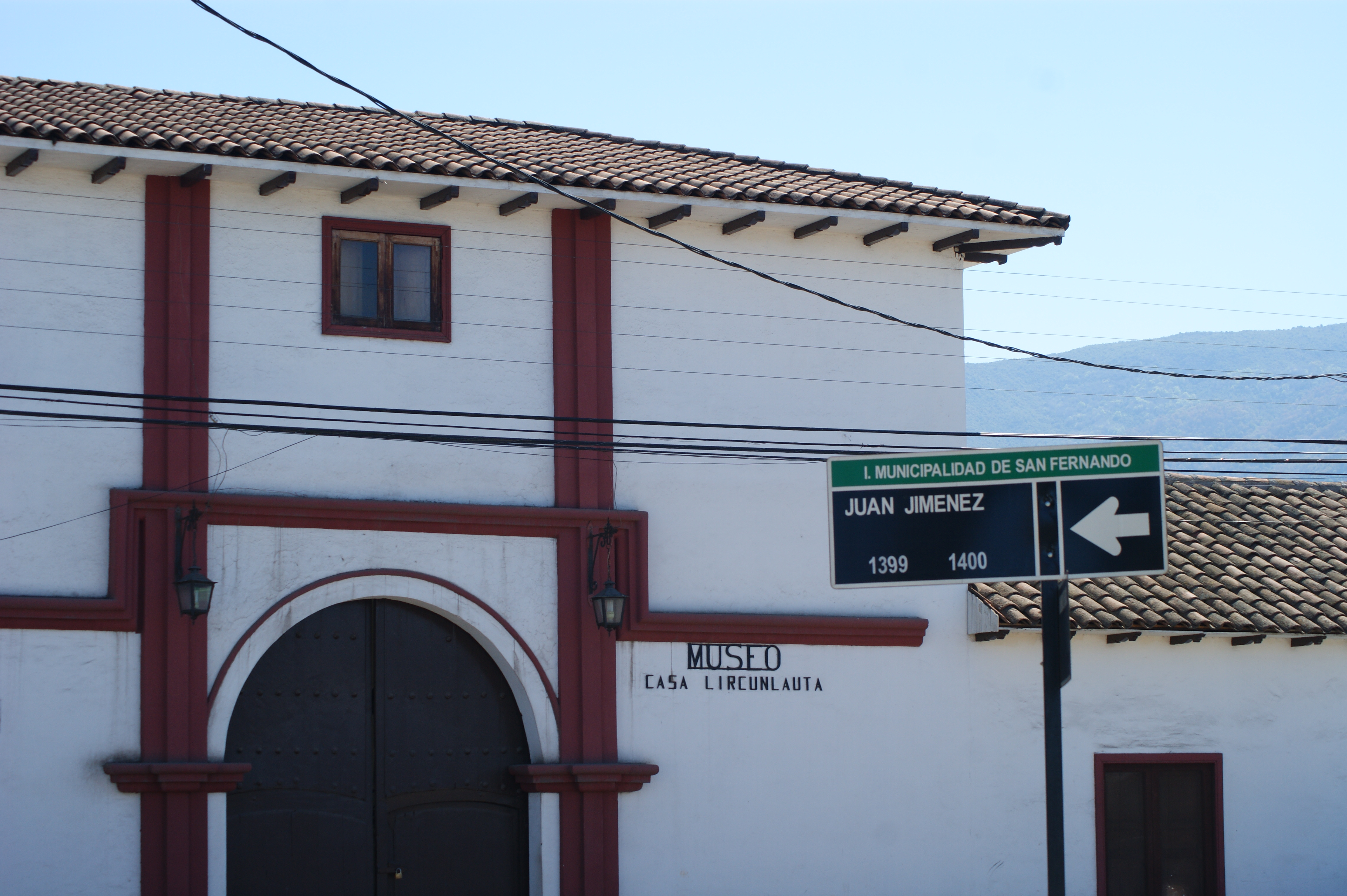 Actual Museo Lircunlauta, la casa del hombre que donó las tierras para la fundación de la ciudad.